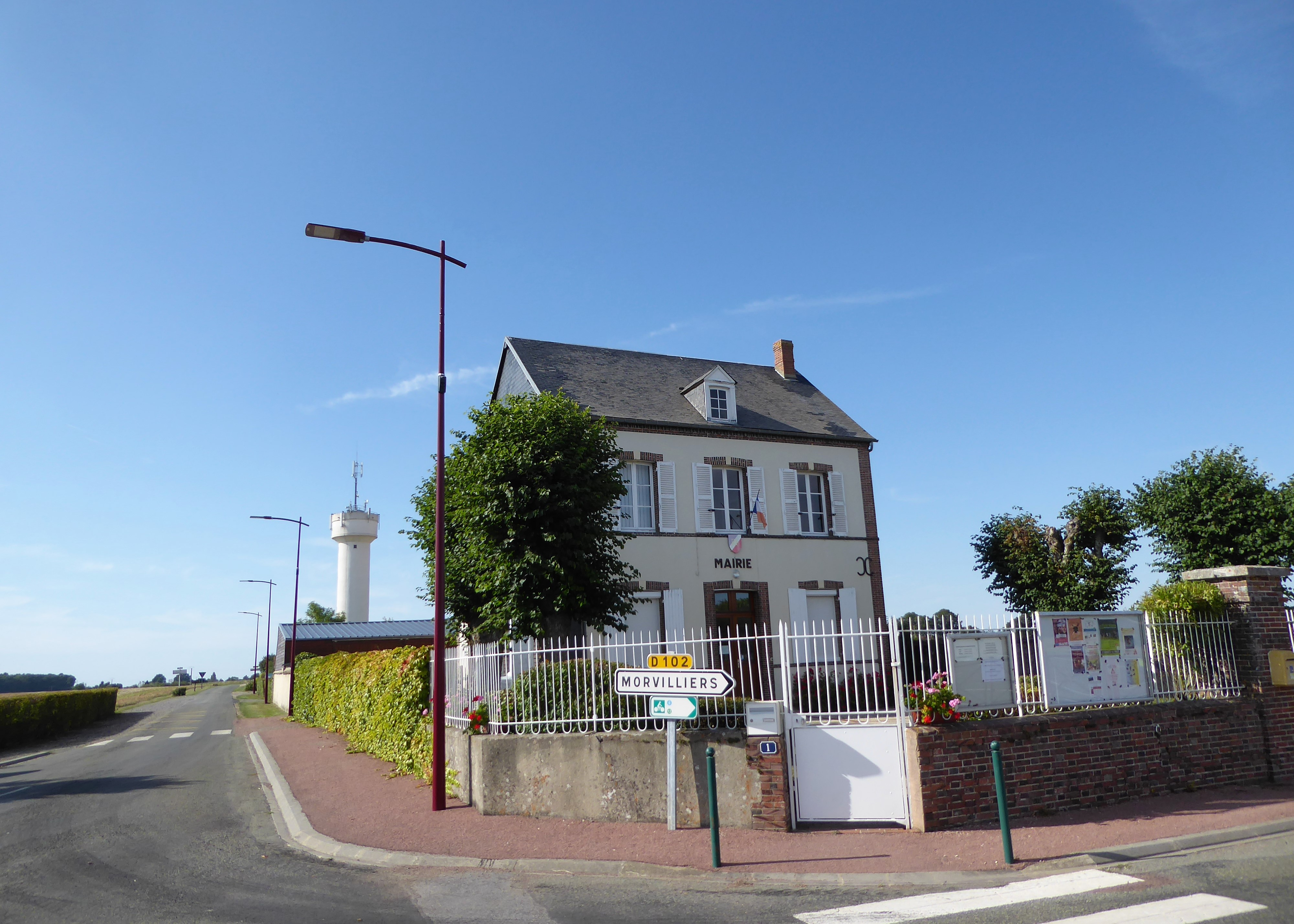 Mairie de Lamblore, Eure-et-Loir, France.